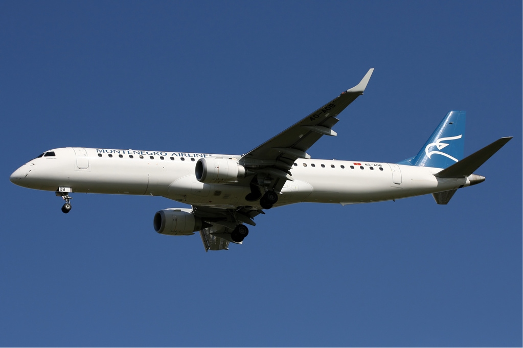 Montenegro Airlines EMB-190